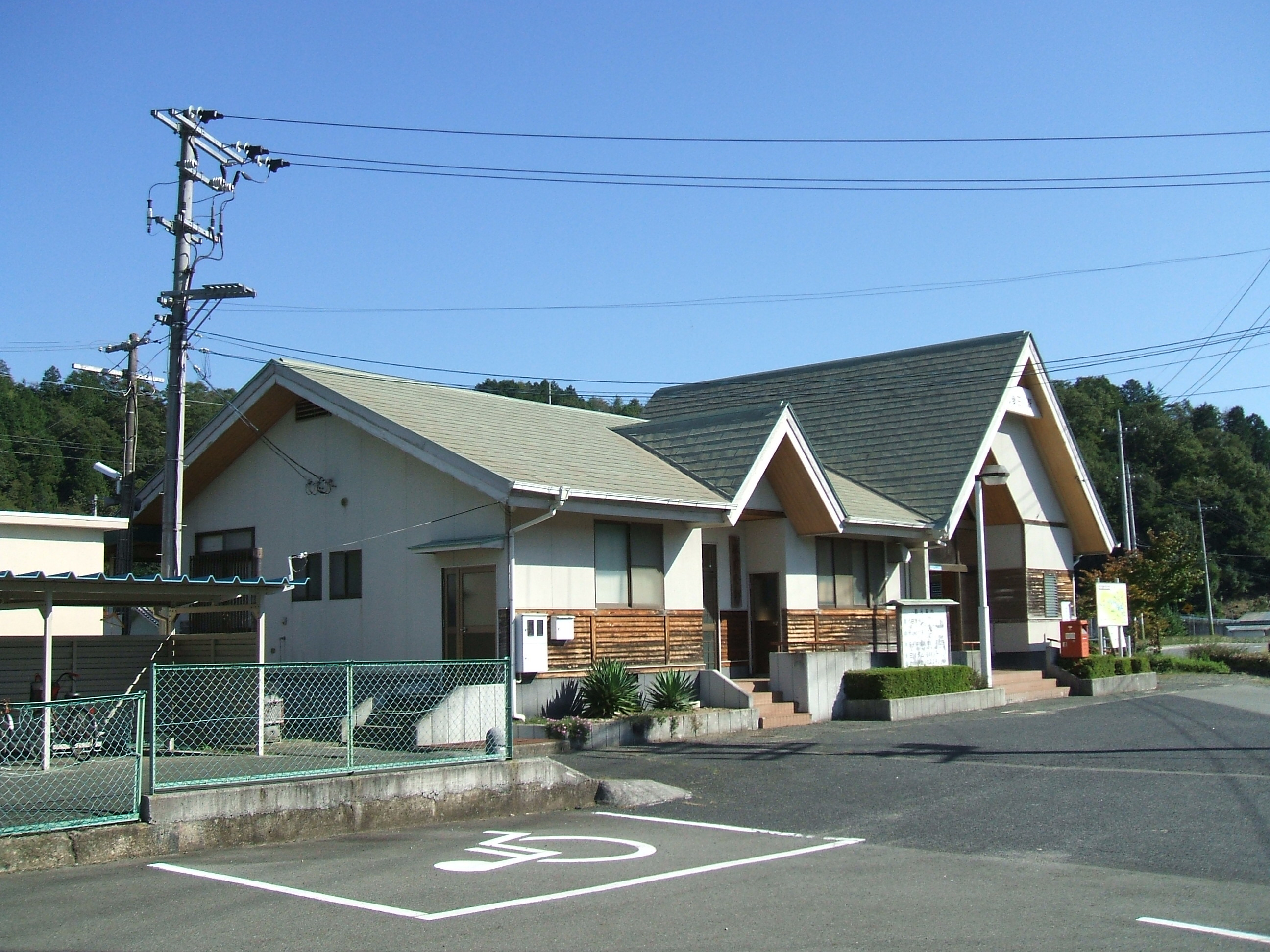 日本国広島県世羅郡世羅町にあるJR西日本福塩線備後三川駅